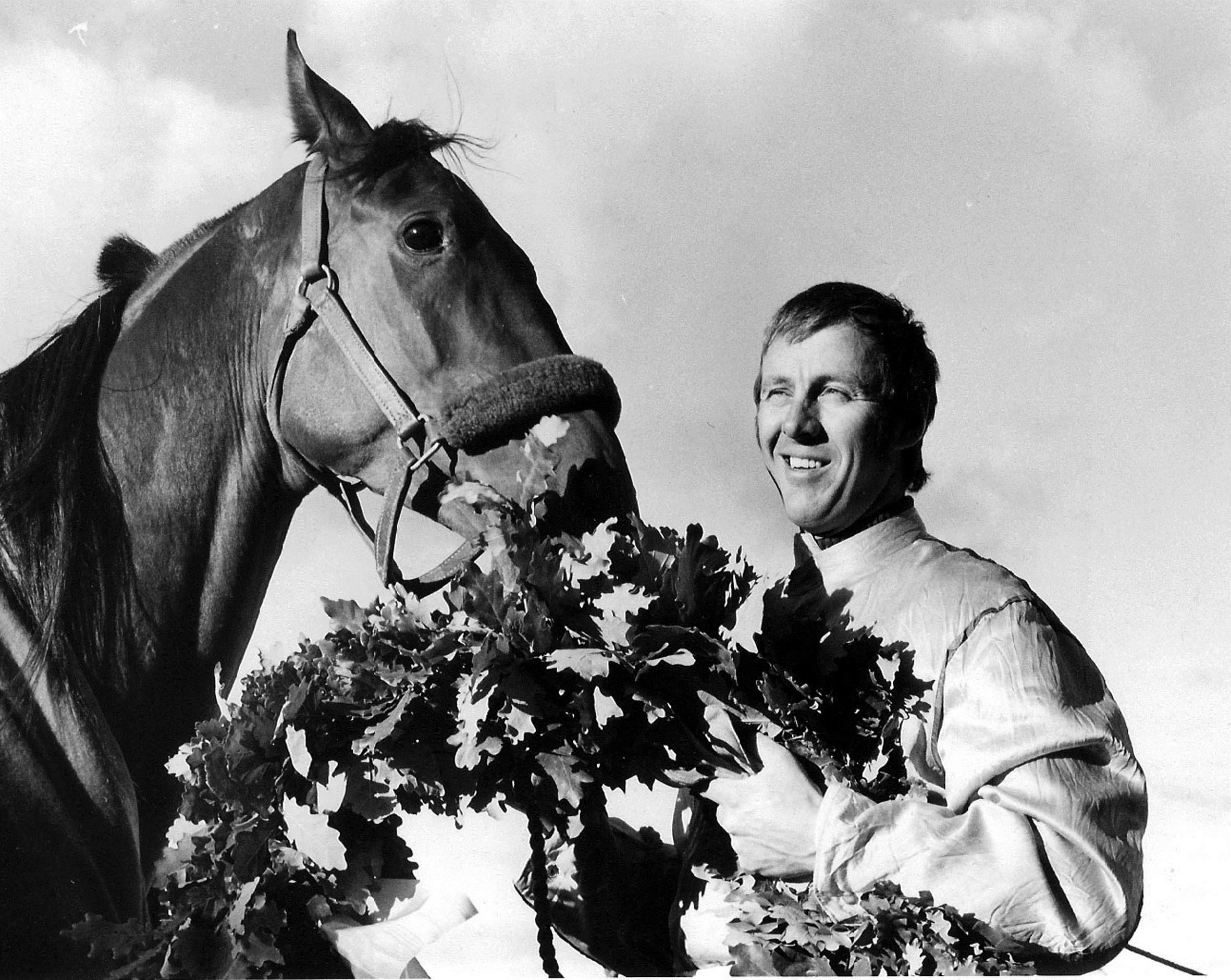 Olle Elfstrand och Lyon